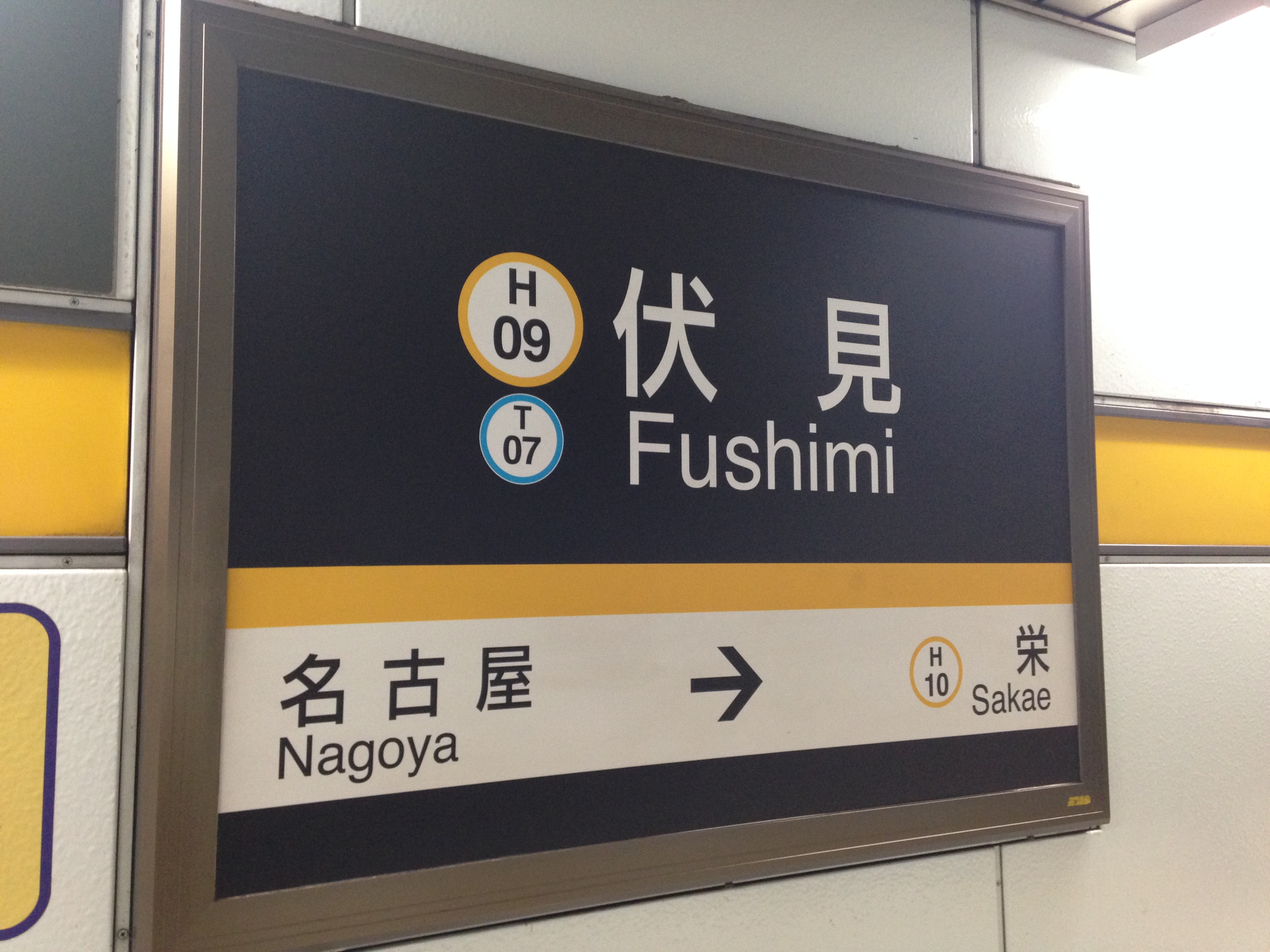 伏見駅(名古屋市営地下鉄東山線)の駅名標